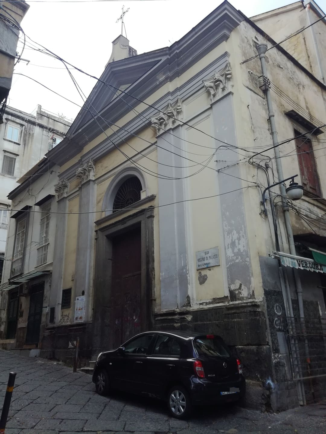 Oratorio di Sant'Anna di Palazzo